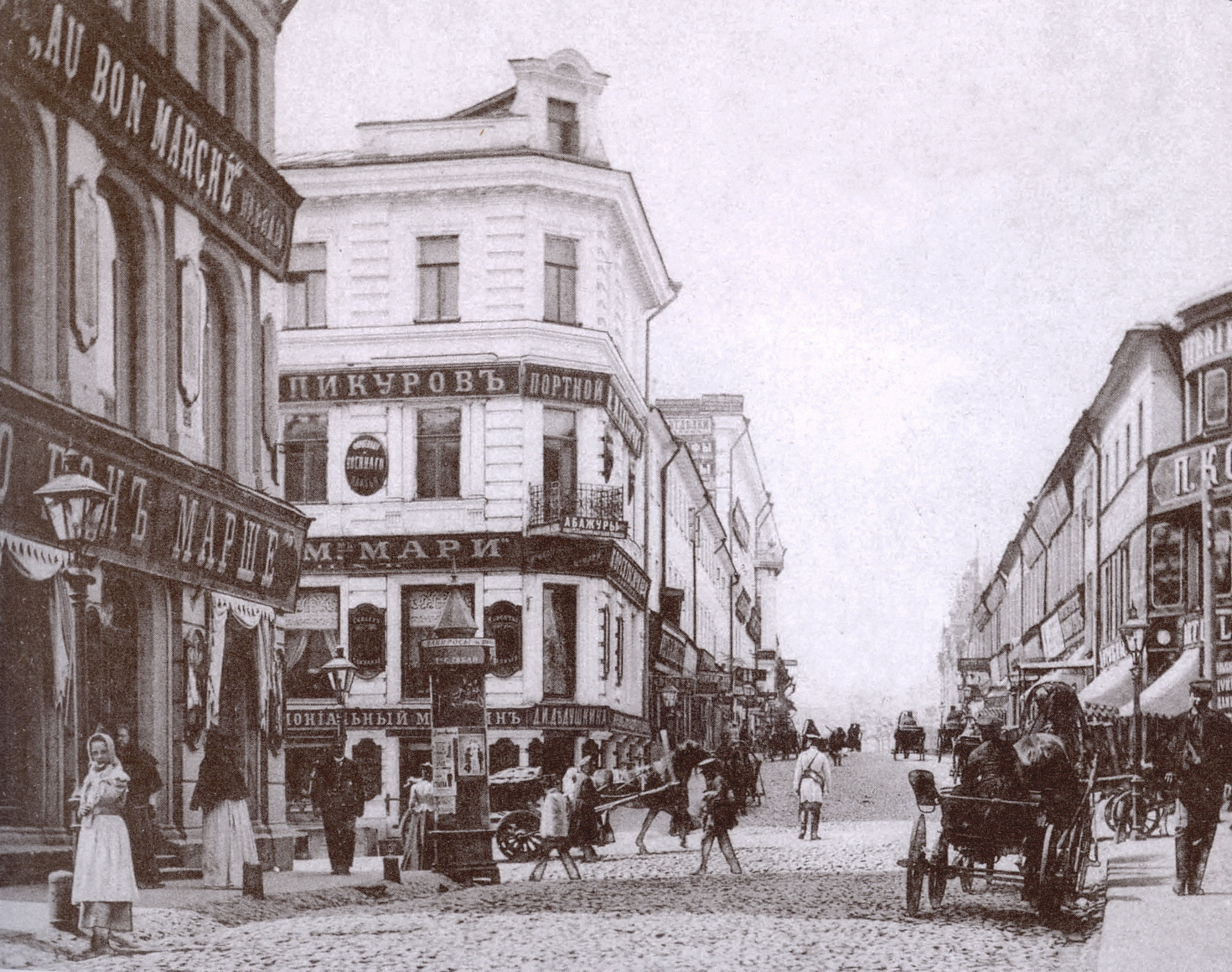 Камергерский переулок, вид с Кузнецкого переулка (Кузнецкого моста)